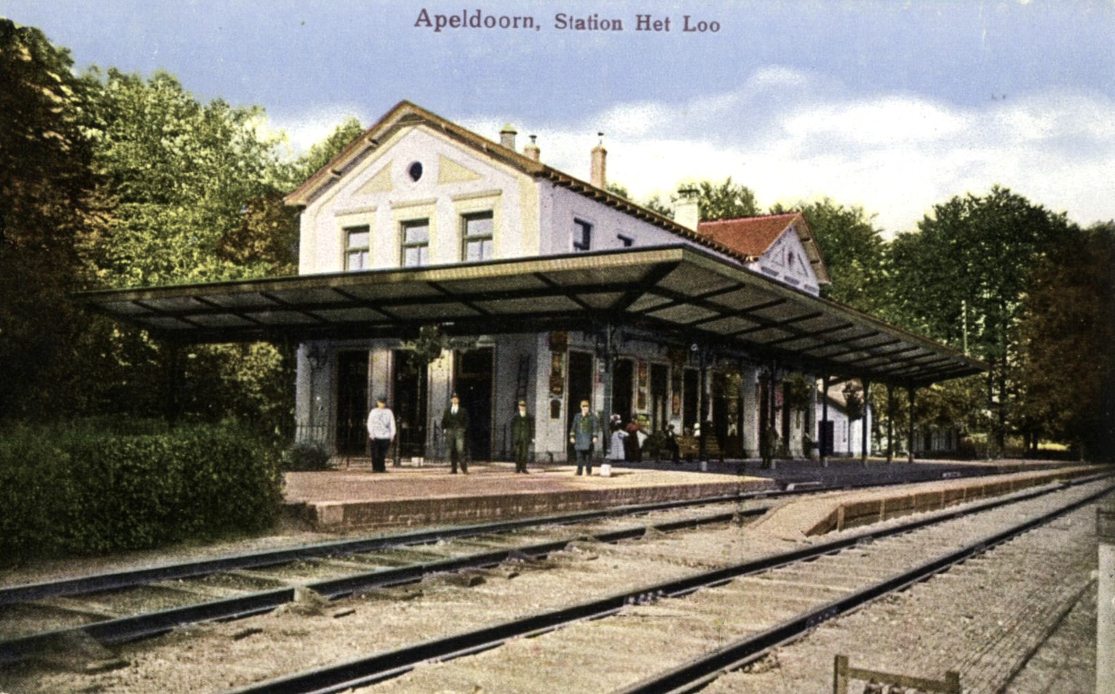 Station Het Loo te Apeldoorn; circa 1910. Collectie van het Utrechts Archief.